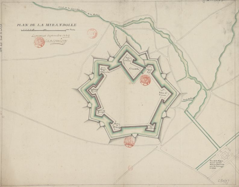 Plan de la Mirandolle. 200 Toises [=Om. 098 ; 1 : 3 985 Signé : ]. La Blottière